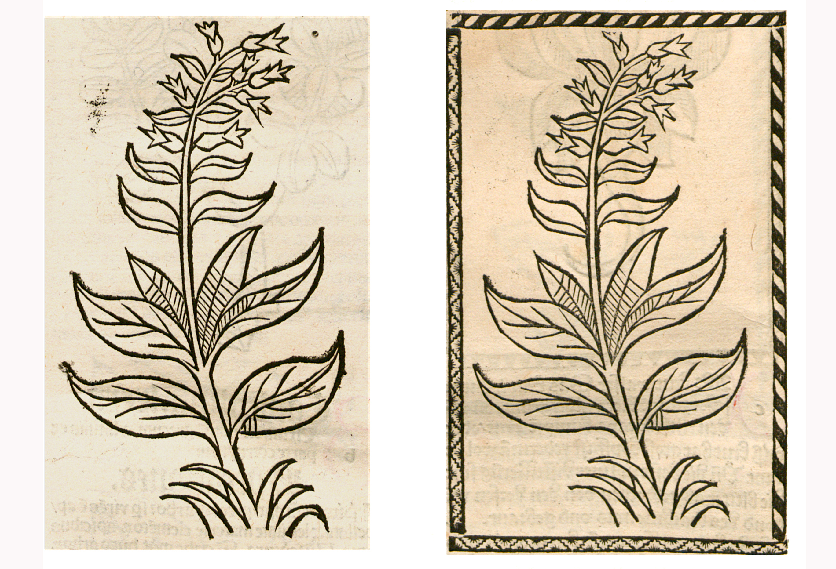 Abbildung von: Erdrauch